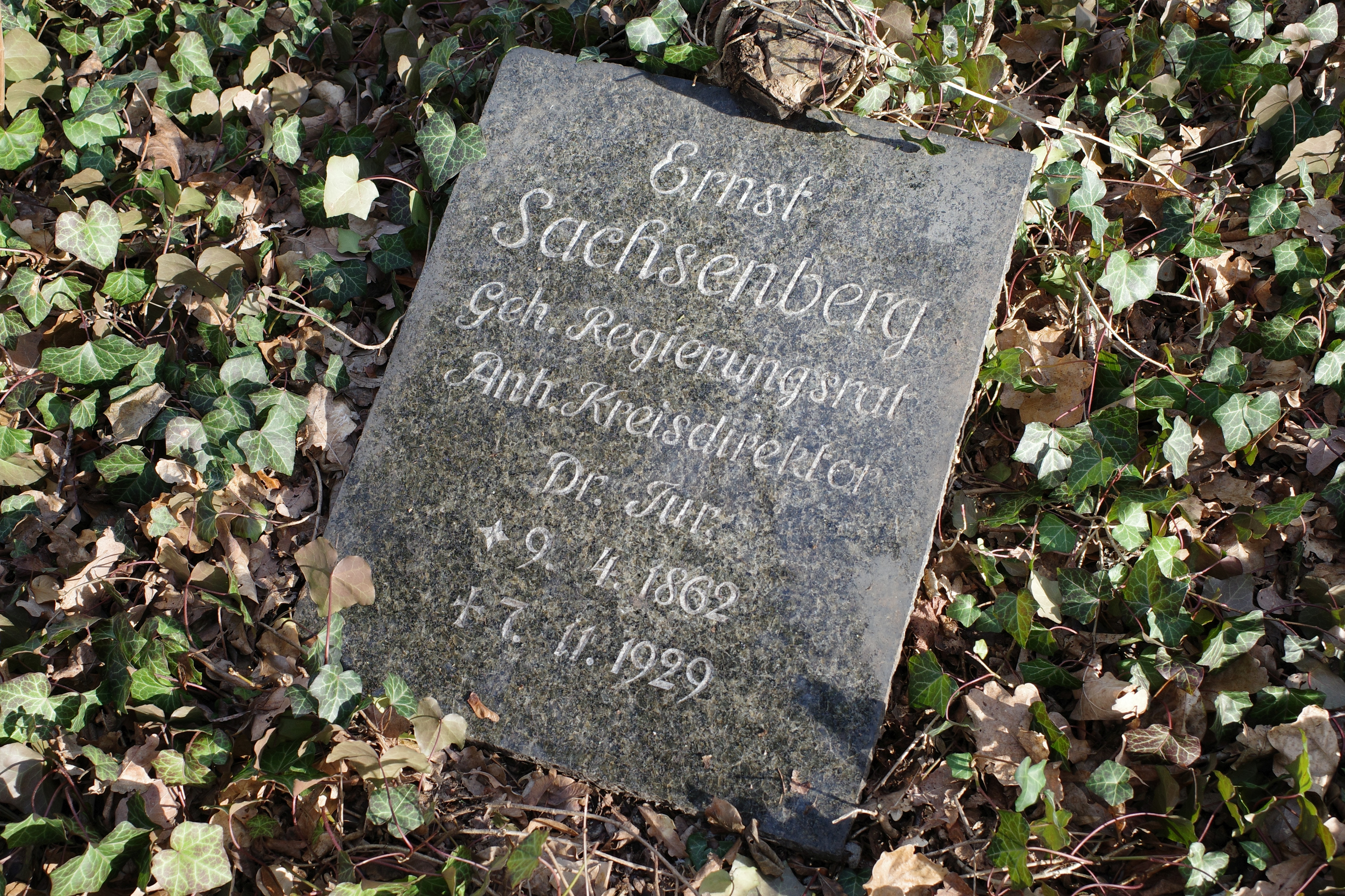 Dessau, Friedhof 3. Ruhestätte von Ernst Sachsenberg.